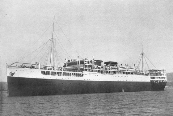 Der französische Liniendampfer ERIDAN für den Dienst nach Australien